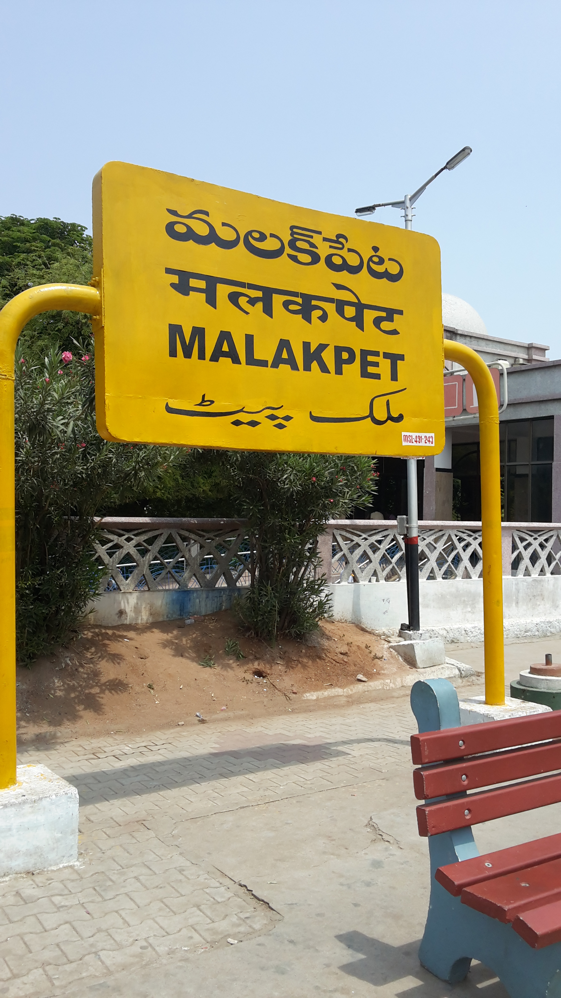 Railway station board